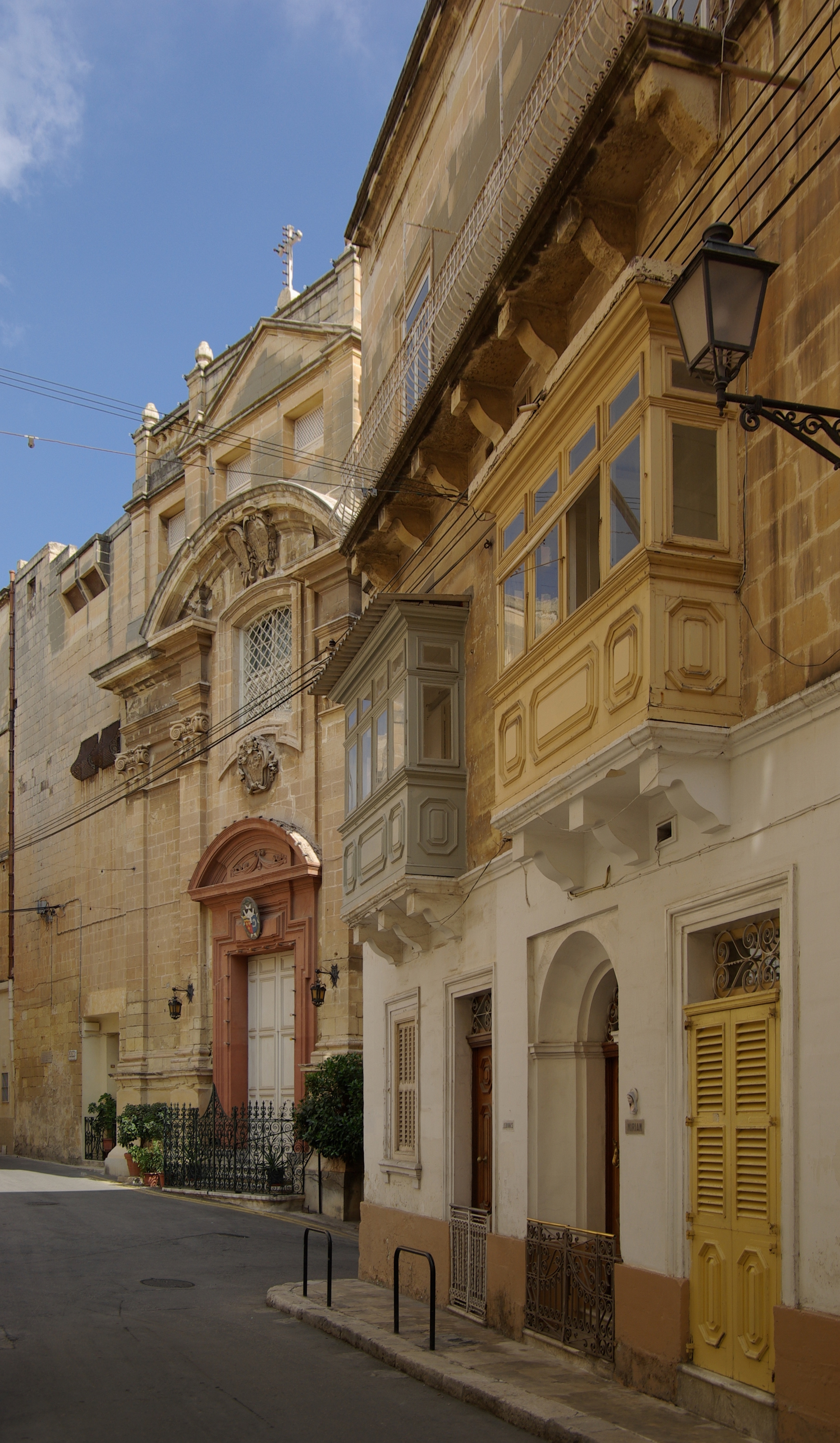 Malta Vittoriosa, Triq Santa Skolastica